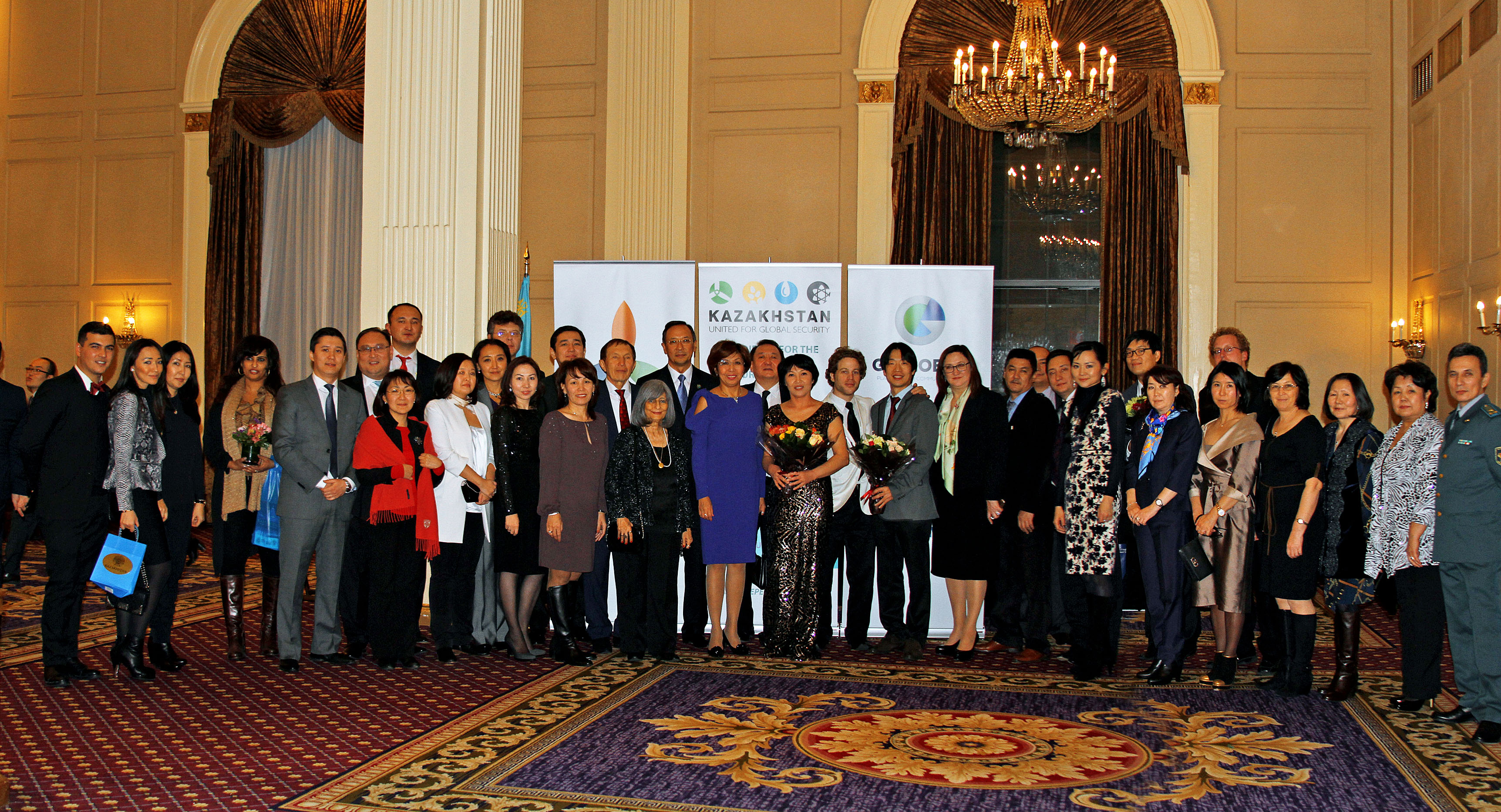 День независимости Казахстана в Нью-Йорке